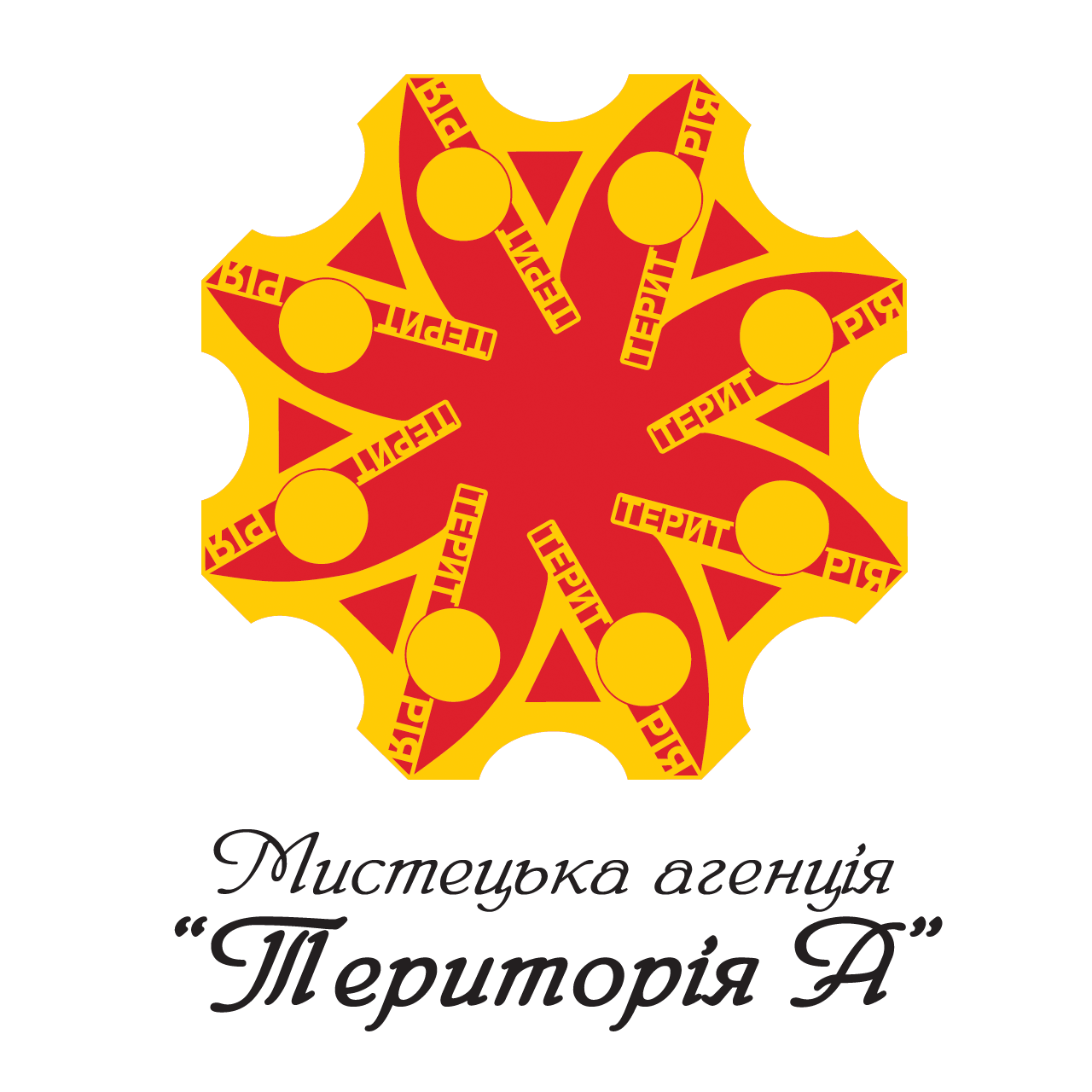 Територія А - Логотип